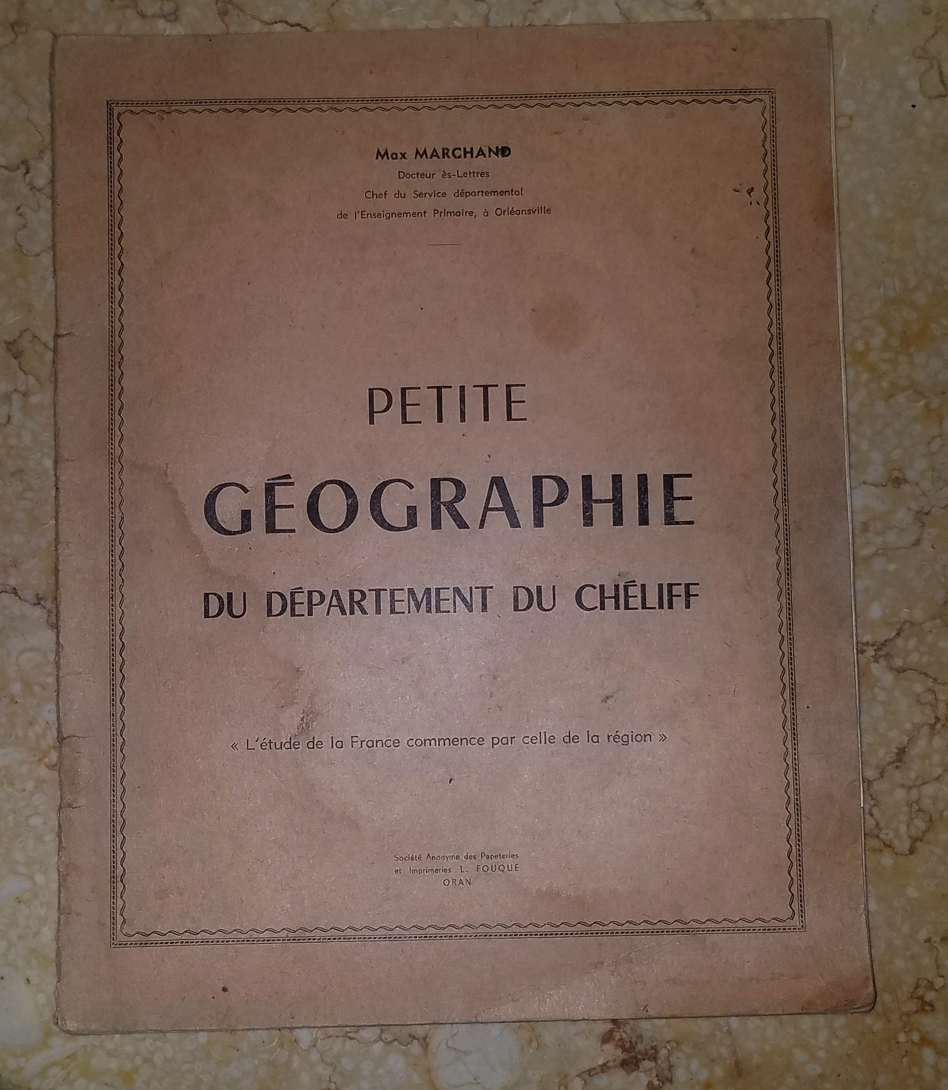 Livre scolaire de géographie de l'enseignement primaire à Orléansville, datant de l'époque coloniale (Octobre 1959)